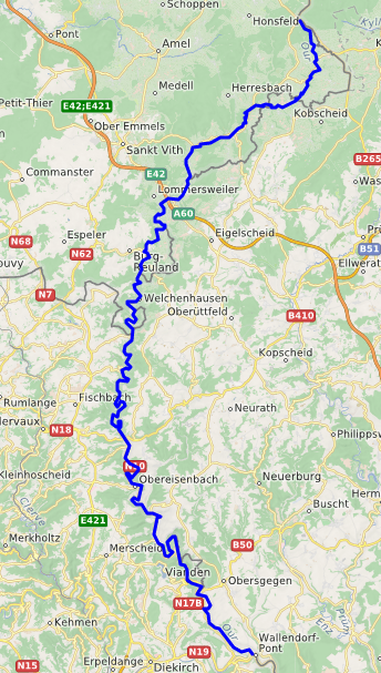 carte réalisée sur umap This map may be incomplete, and may contain errors. Don't rely solely on it for navigation.